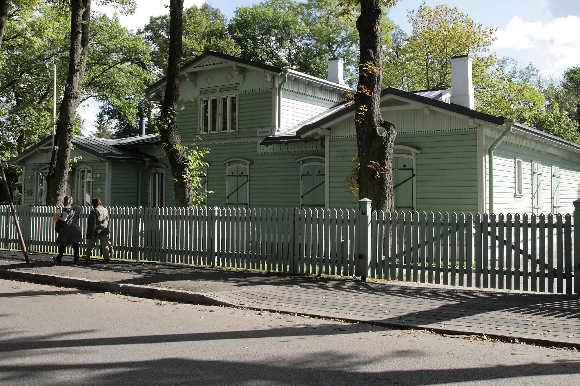 Tallinn, villa J.Poska 8, 19. saj